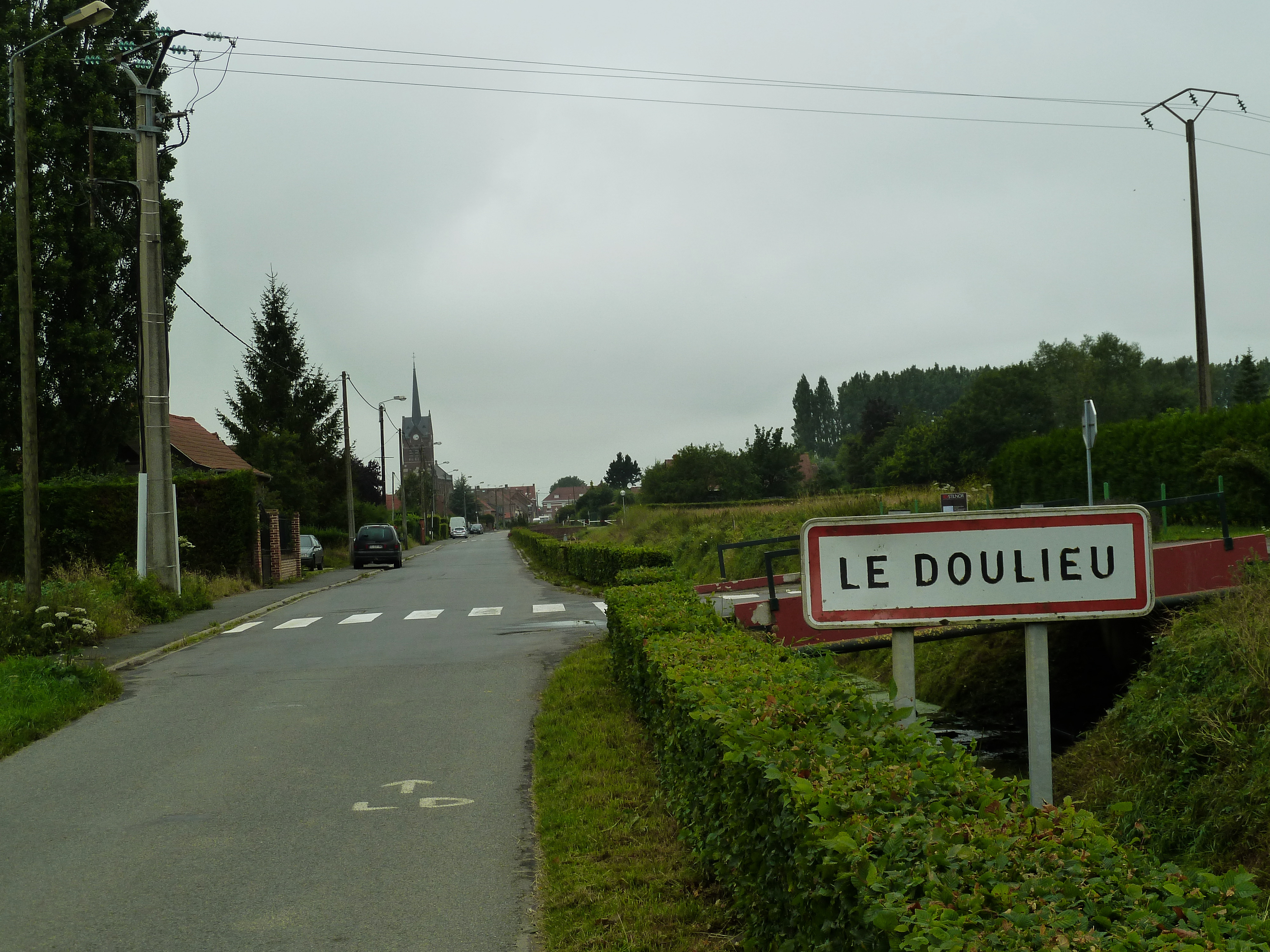 Panneau indicatif de la ville Le Doulieu Nord.- France.